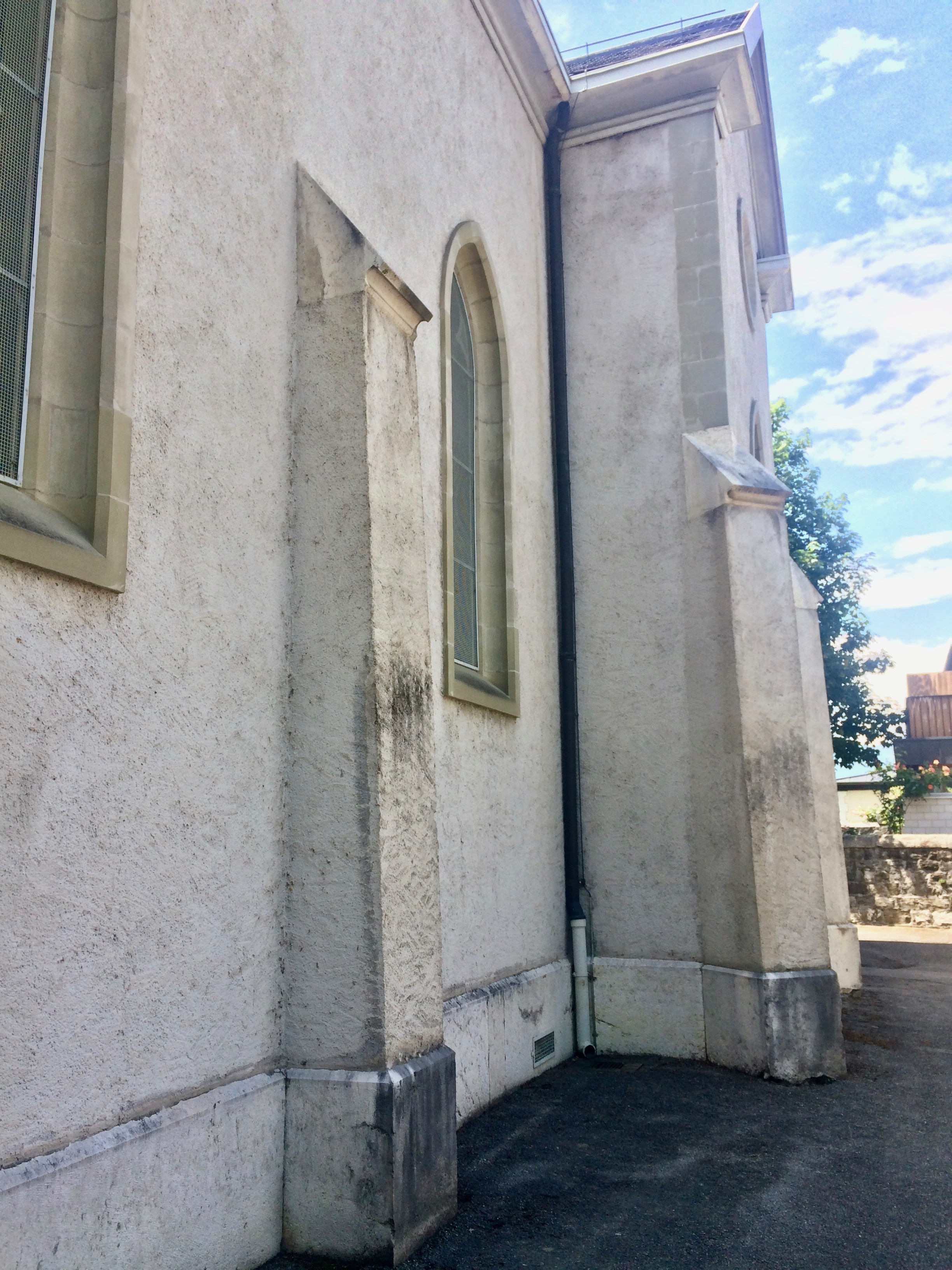 Un contrefort de l'église Sainte-Pétronille à Pregny-Chambésy.